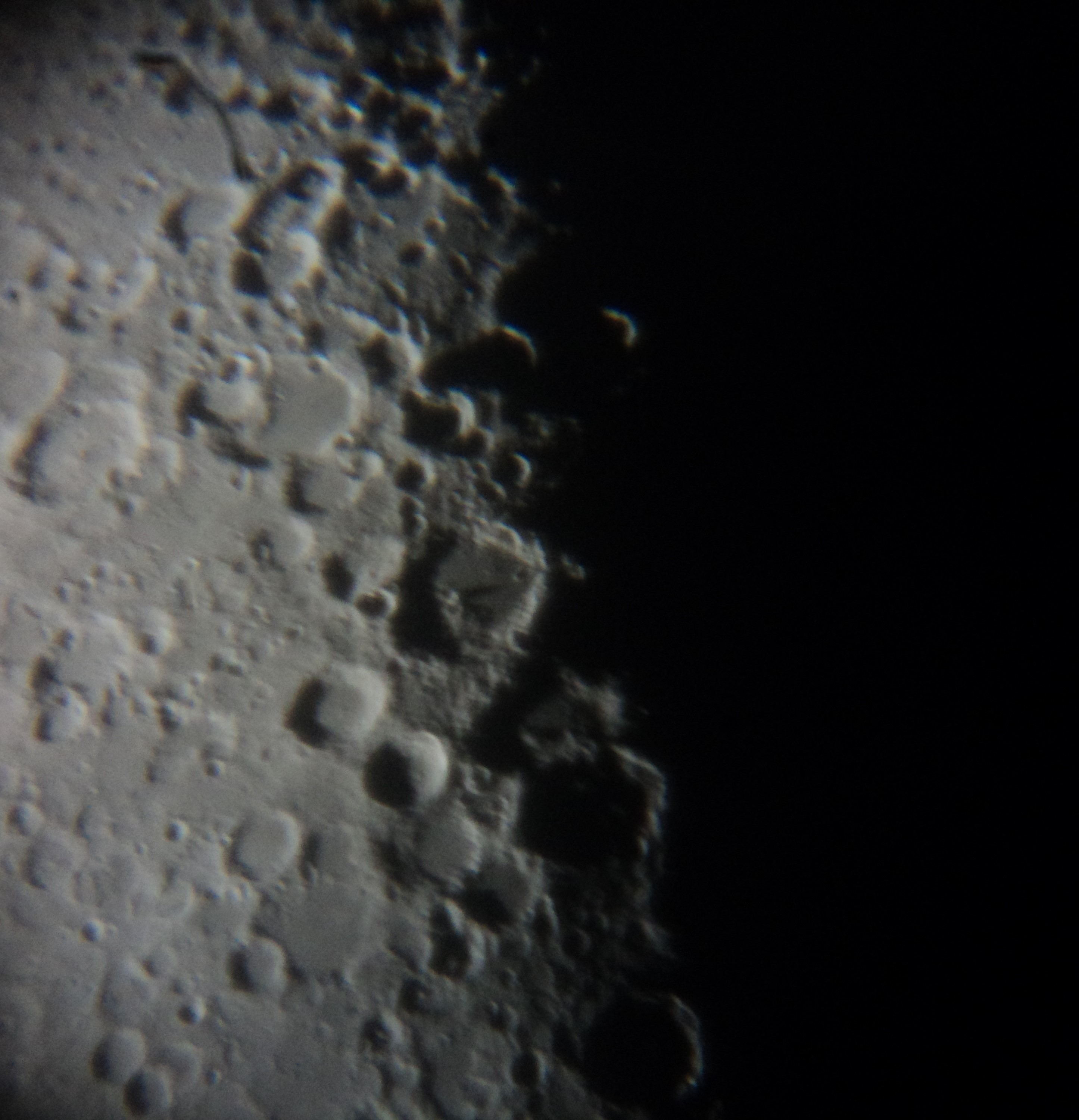 LUNA DE 7 DÍAS Y 19 HS. Luna en Cuarto Creciente. Se observan cinco cráteres relevantes sobre el terminador: en el centro el cráter: Walter, con sombra de su pico central. Debajo el cráter Regiomontanus, abajo y solapado a éste el Purbach (más oscuro) y un poco a la izquierda entre ambos, el Werner. Encima de este, hacia la izquierda, el Aliacensis. Con telescopio: 145 aumentos. 17.05.2013 18:17 hs. Villa Gesell. Argentina.